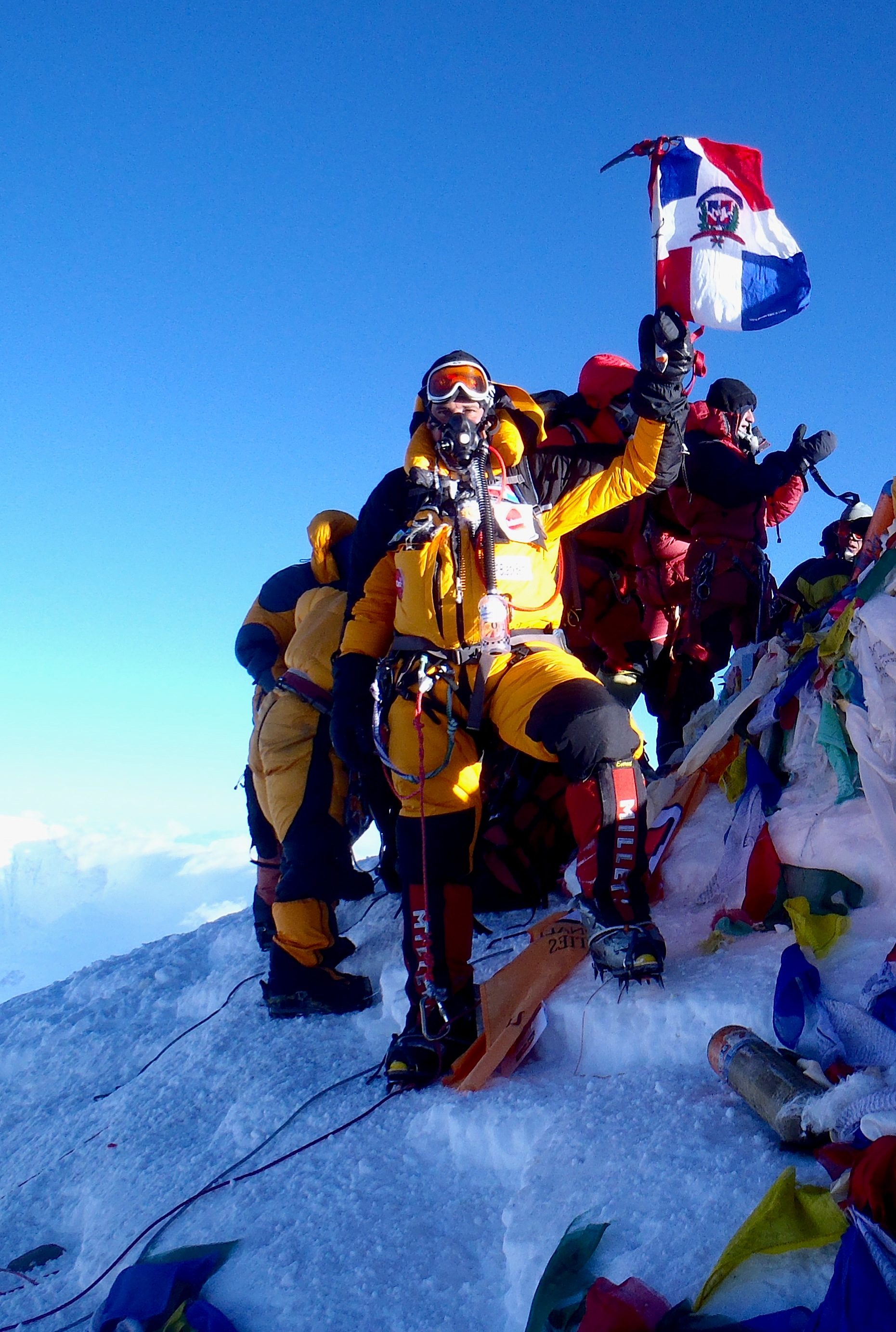 Ivan Gomez alza la bandera Dominicana en la cima del Everest